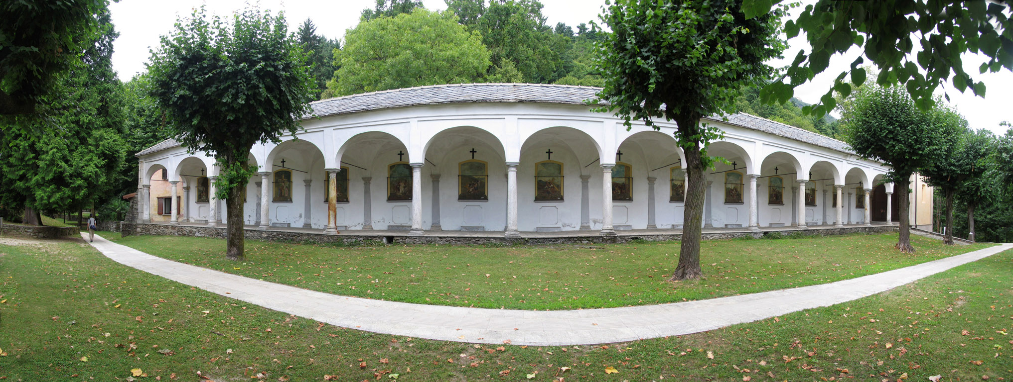 Sacro Monte della Ss. Trinità di Ghiffa 07/2009